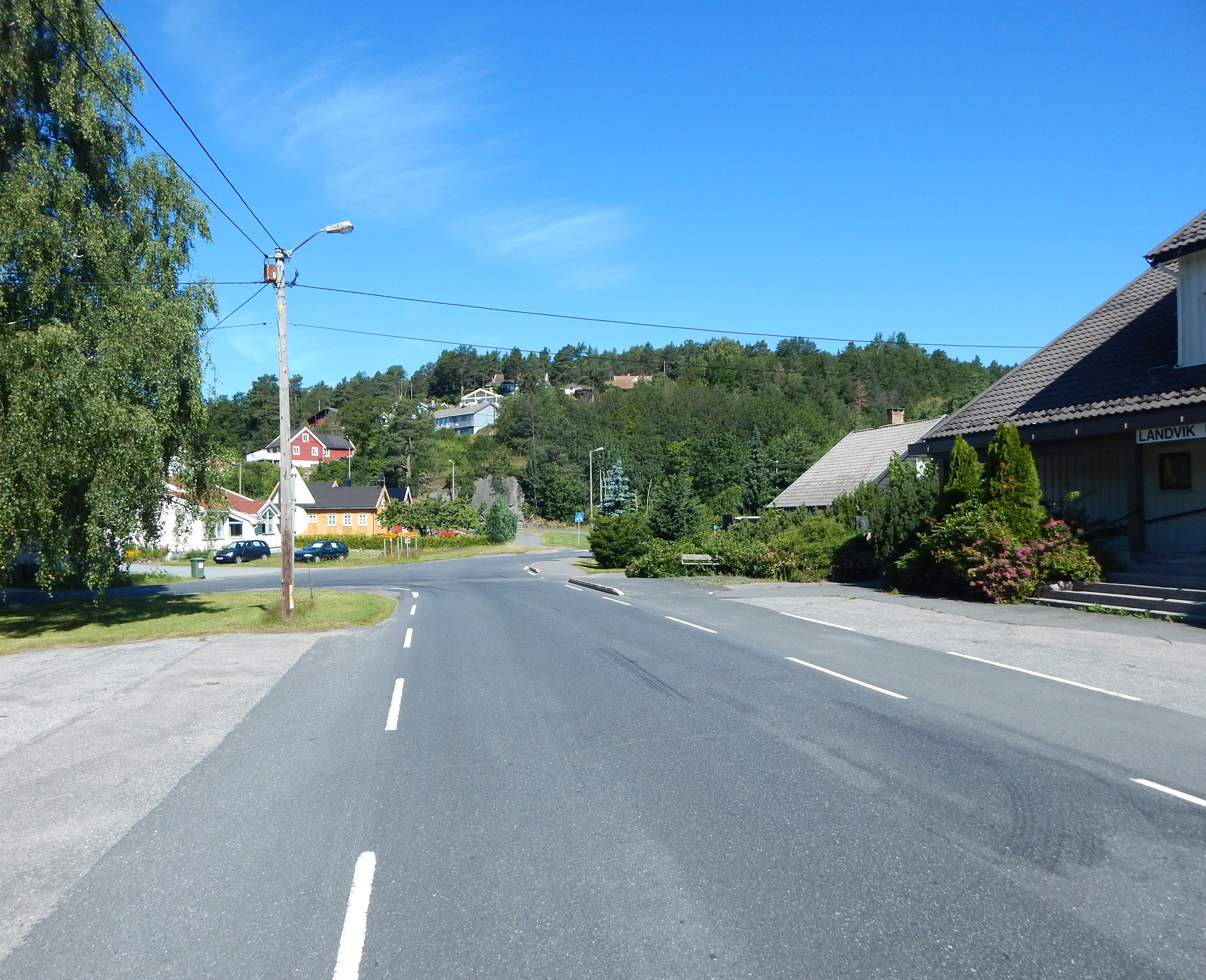 Fylkesvei 33 i Øvre Landvik, like nord for kirkegården